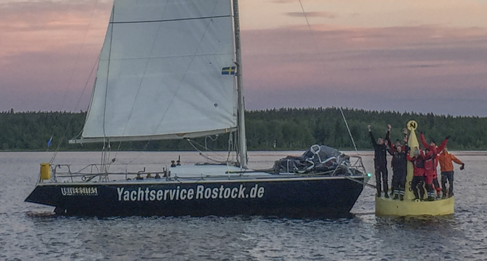 Die gelbe Tonne in Töre markiert das Ziel